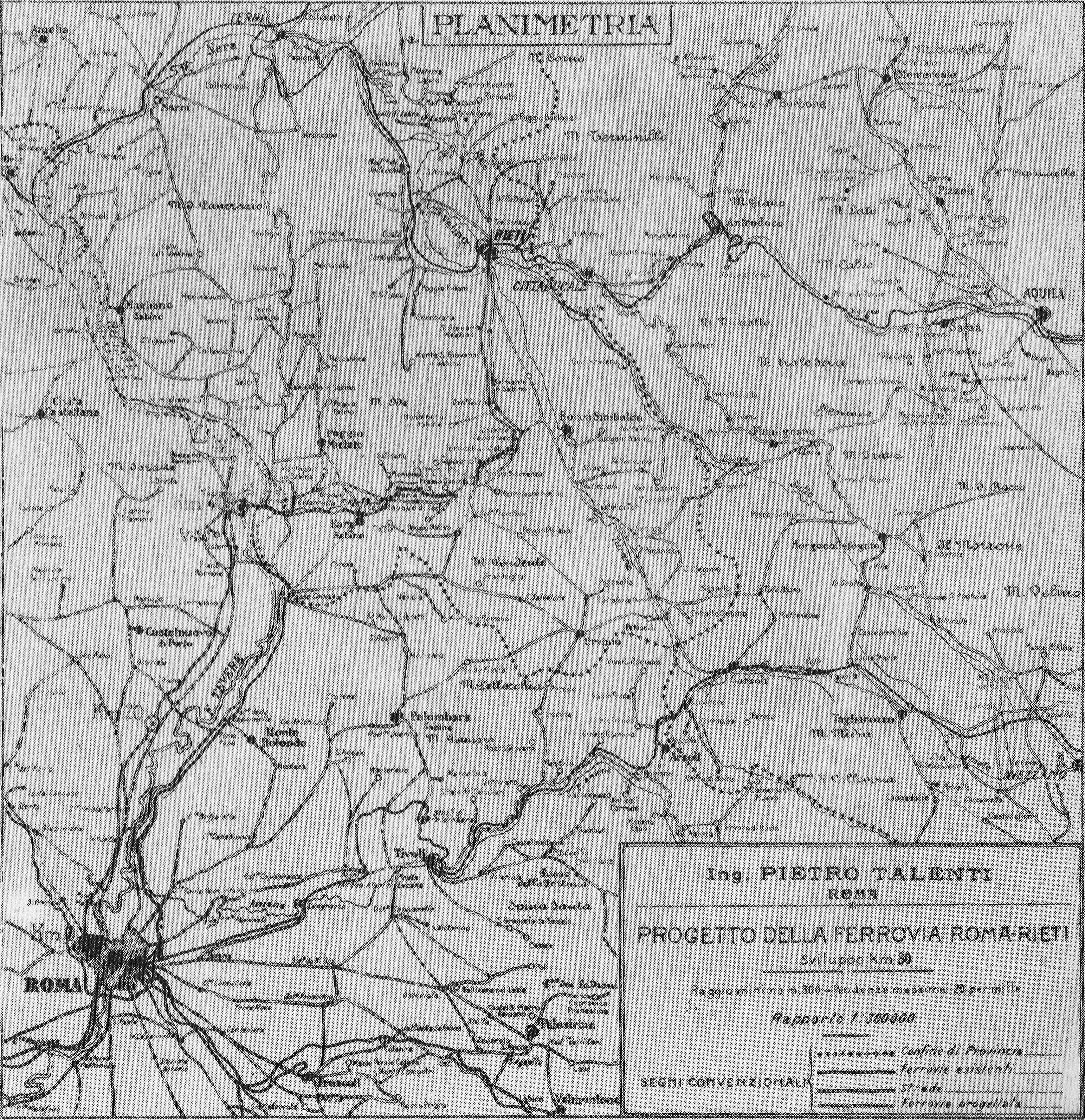 Planimetria del progetto per la ferrovia Rieti-Roma realizzato nel 1913 dall'ingegner Pietro Talenti